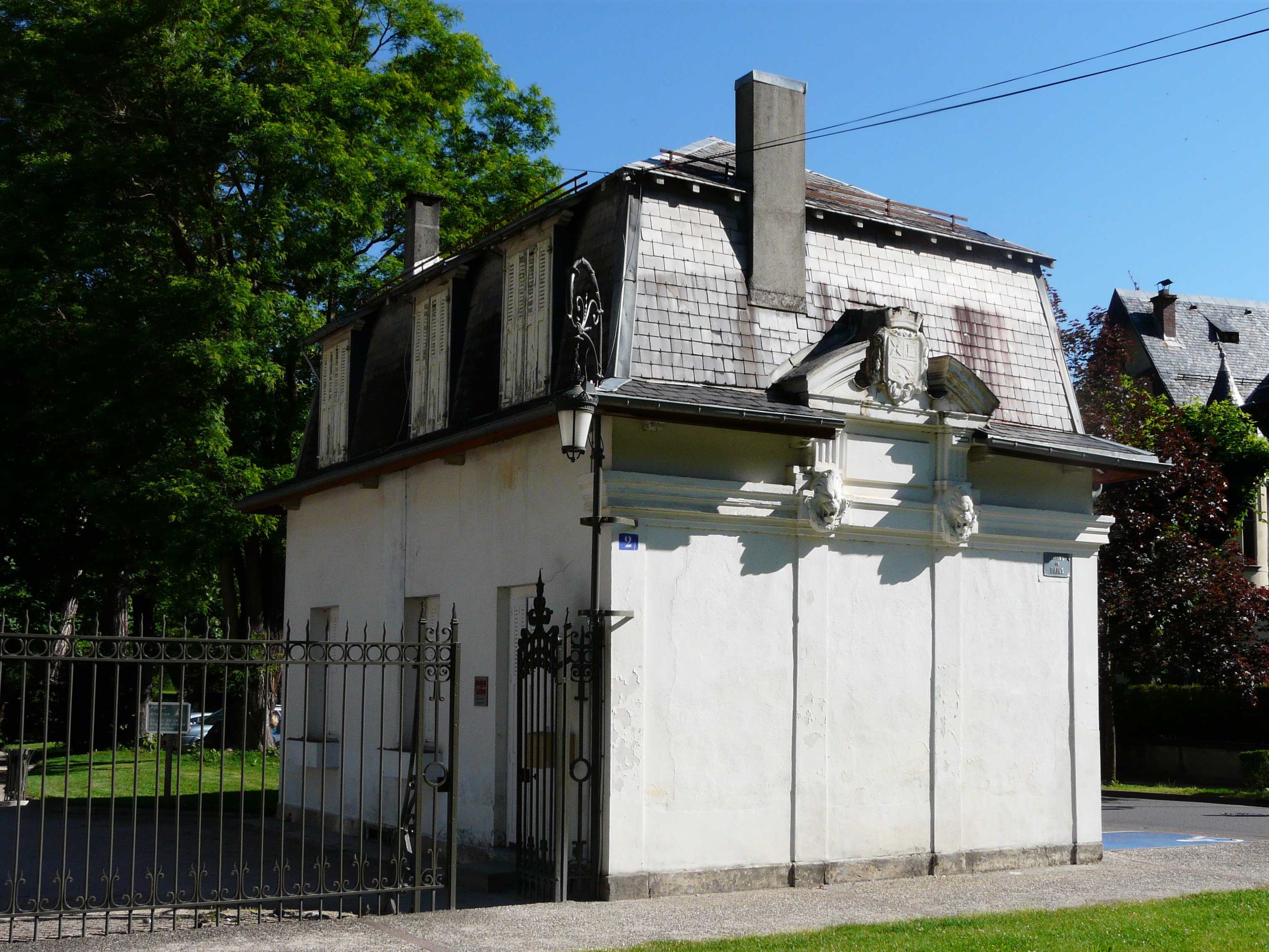 L'un des deux pavillons d'entrée au parc du casino de Bagnères-de-Luchon, Haute-Garonne, France.